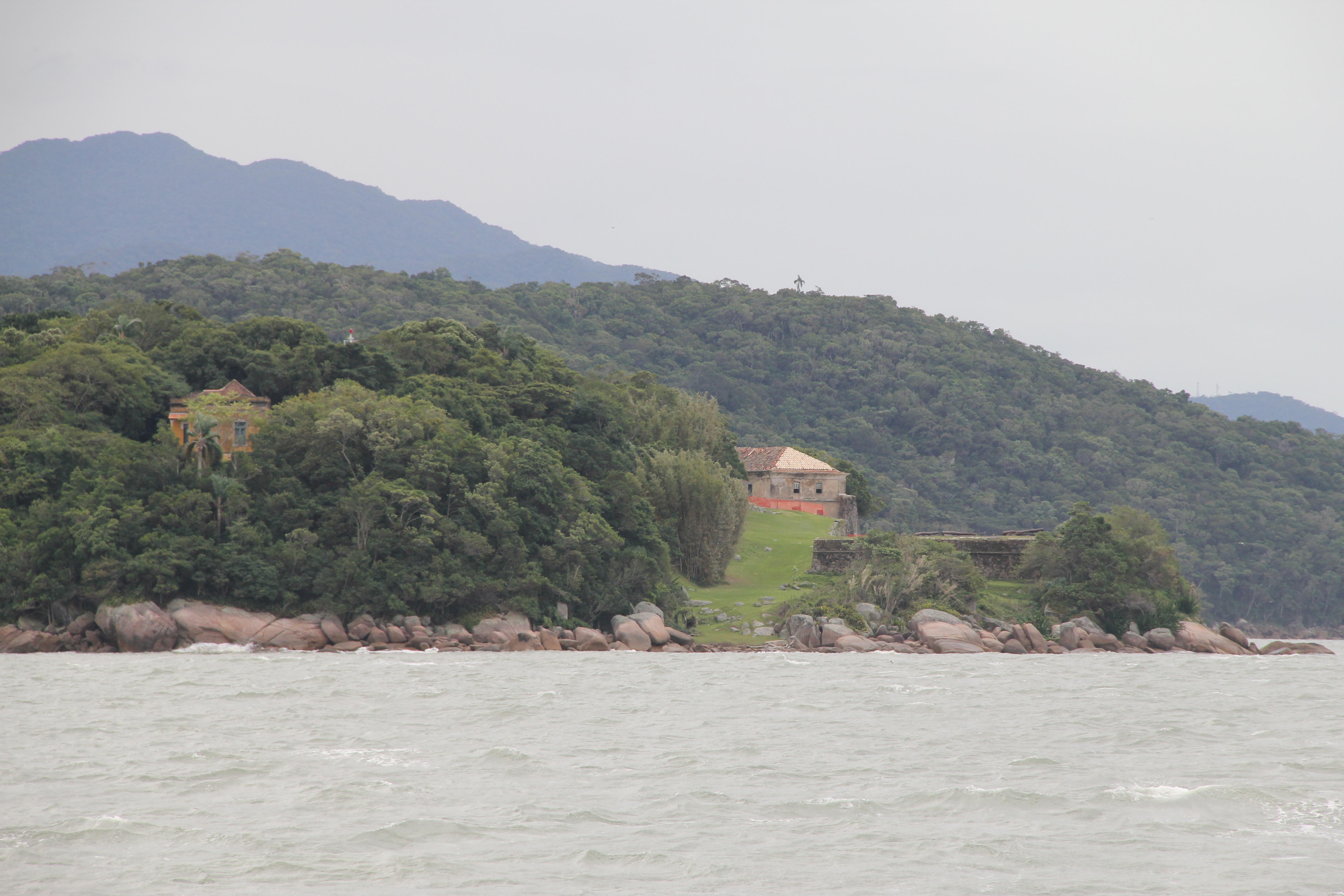 A Fortaleza de Santa Cruz de Anhatomirim, localizada na Ilha de Anhatomirim, foi a principal fortificação do antigo sistema defensivo da Ilha de Santa Catarina, projetada e construída pelo brigadeiro português José da Silva Paes a partir de 1739. Este sistema era composto ainda pelas fortalezas de São José da Ponta Grossa, Santo Antônio de Ratones e Nossa Senhora da Conceição de Araçatuba.